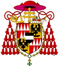 Znak kardinála Antonína Theodora Colloredo-Waldsee-Mels